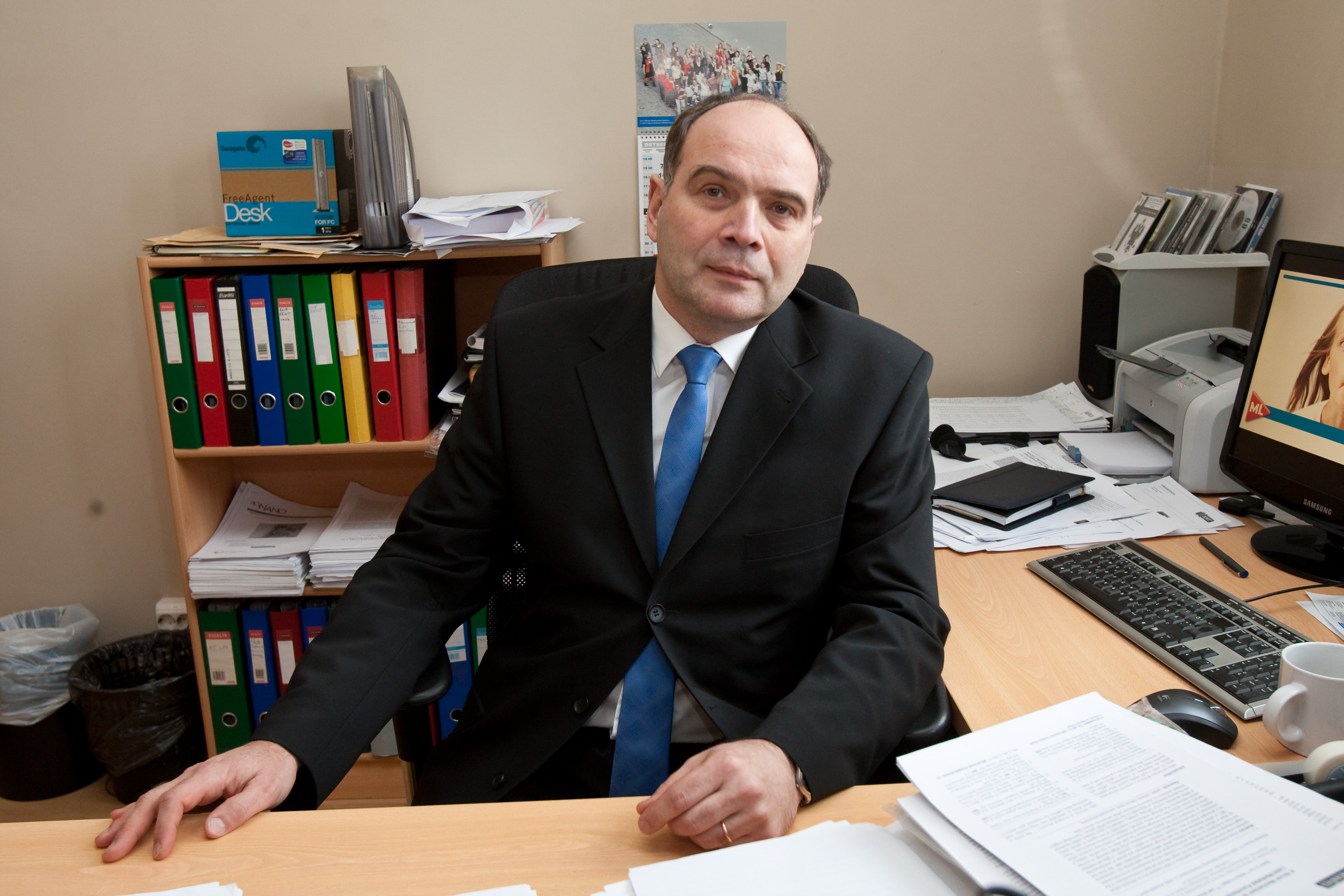 Tartu Ülikooli Molekulaar- ja Rakubioloogia Instituudi arengubioloogia õppetooli juhataja, keemilise bioloogia professor Margus Pooga.